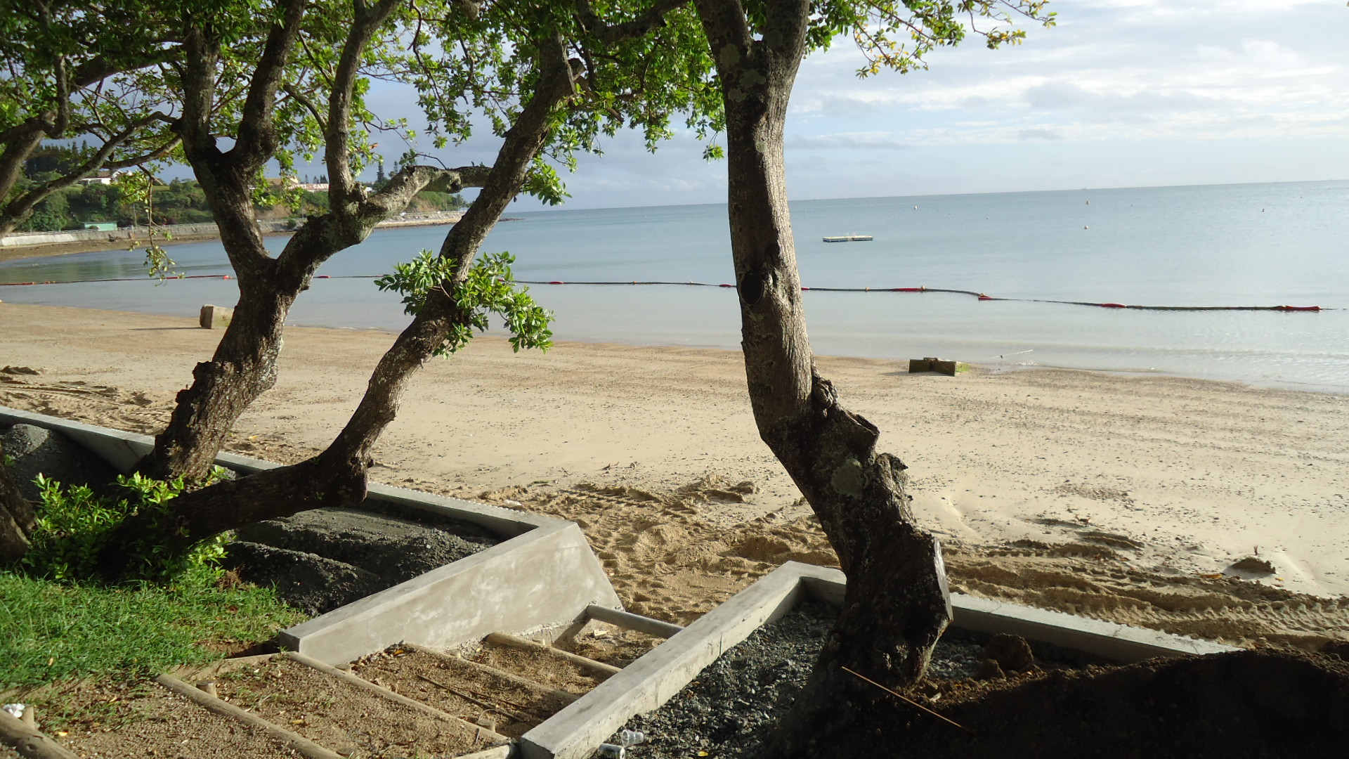 Travaux à la baie des Citrons à Nouméa